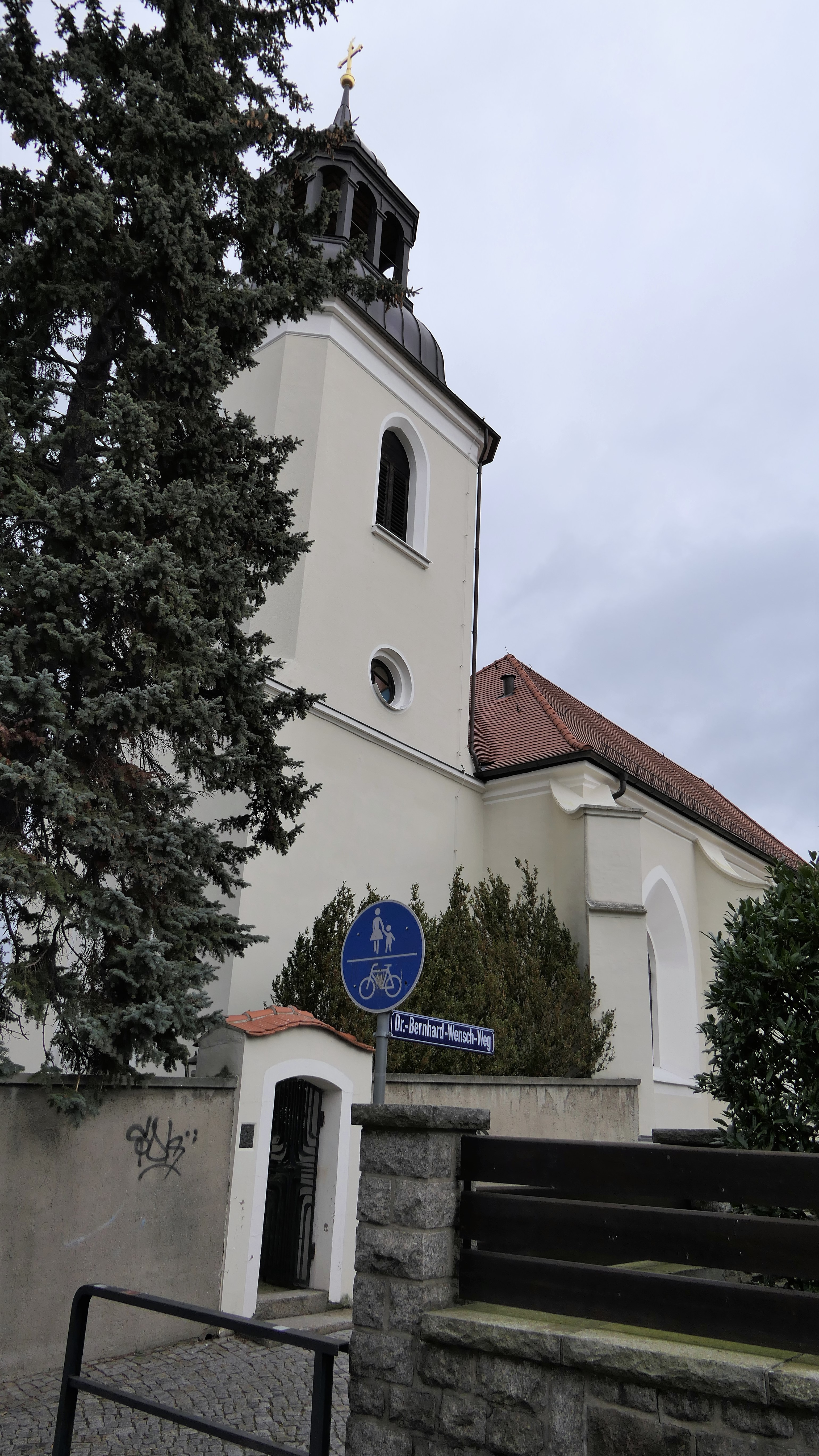 Pfarrkirche St. Maria Magdalena in Kamenz, Dr.-Bernhard-Wensch-Weg entlang der Kirche sowie Stolperstein für Dr. Bernhard Wensch am Eingangstor